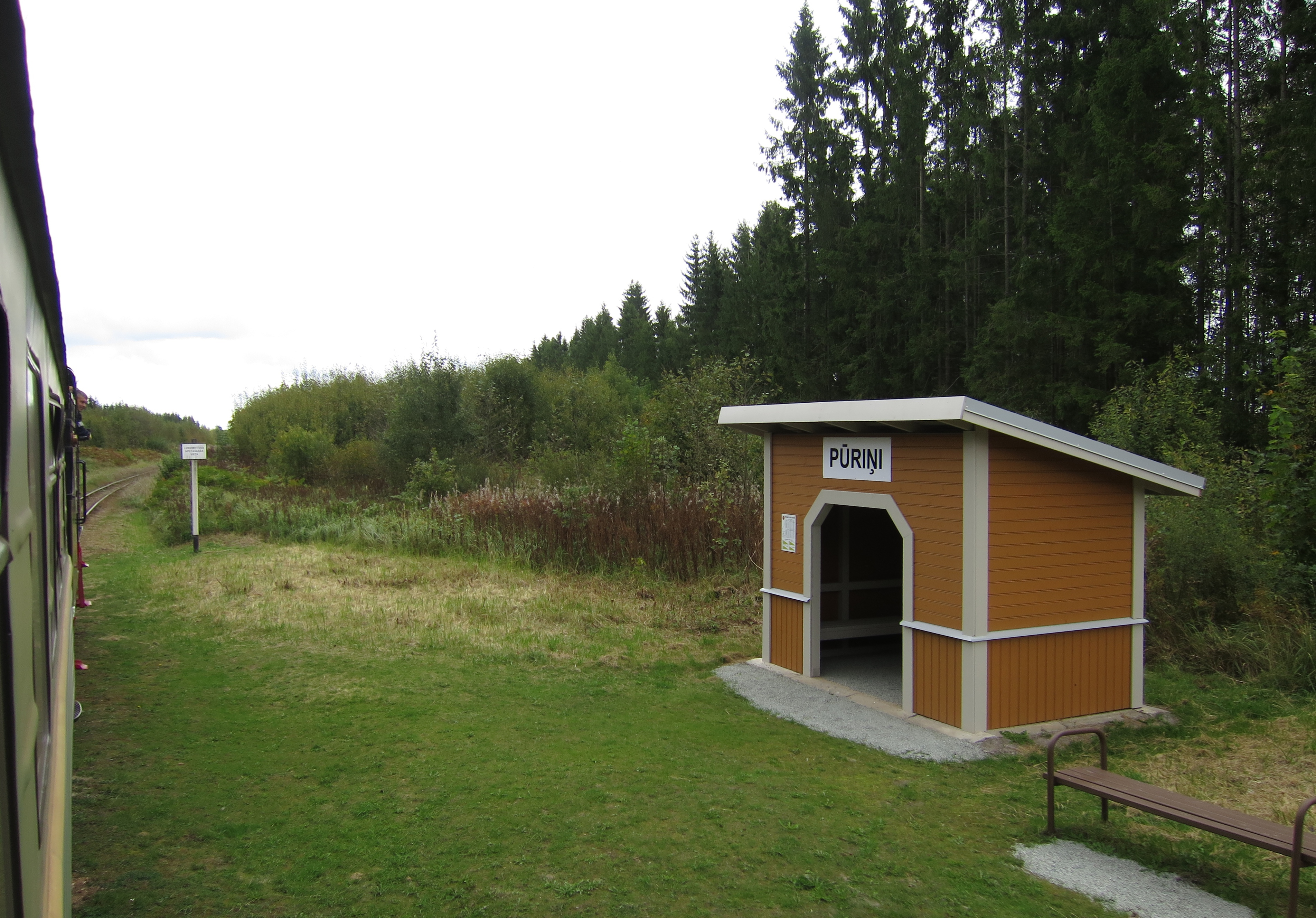 Pūriņu stacijas nojume